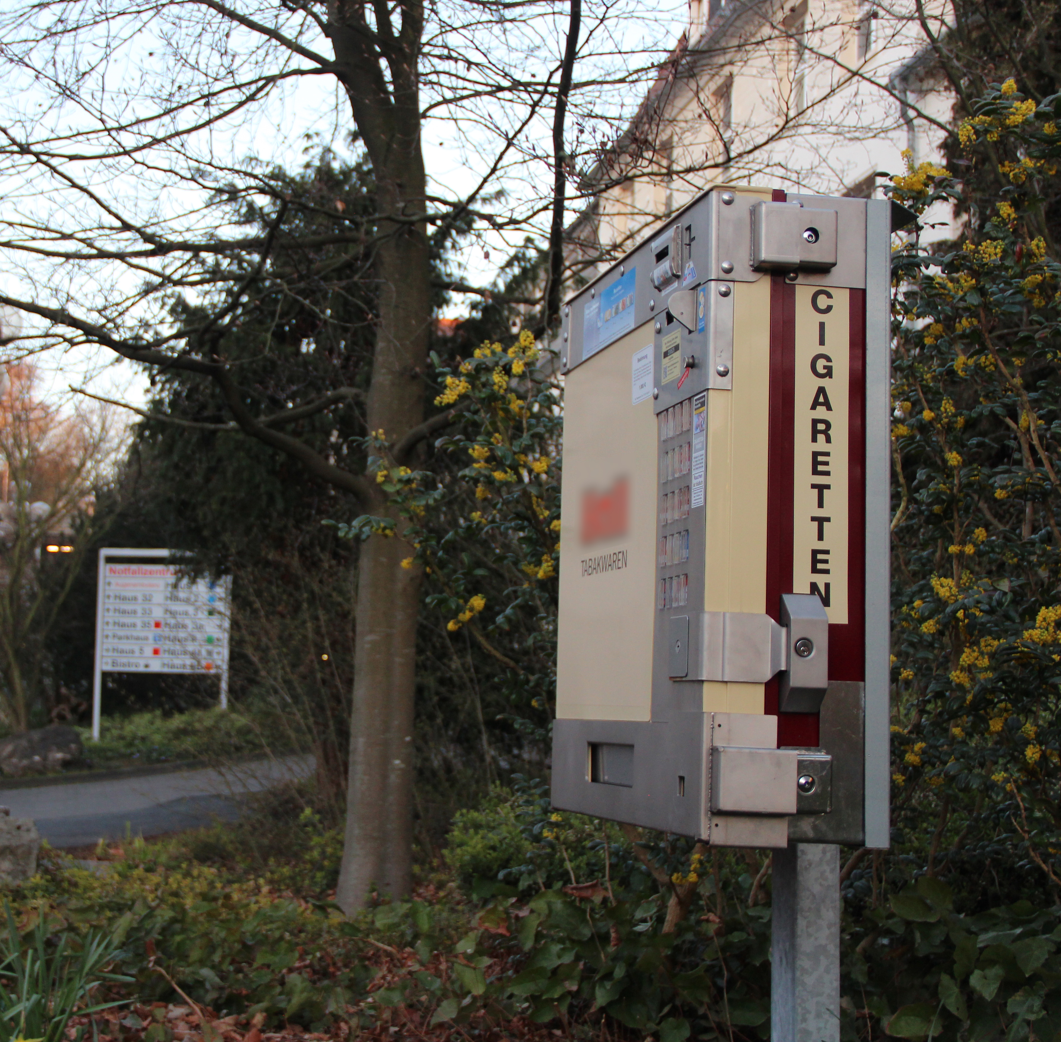 Sigarettenautomaat op het terrein van een ziekenhuis